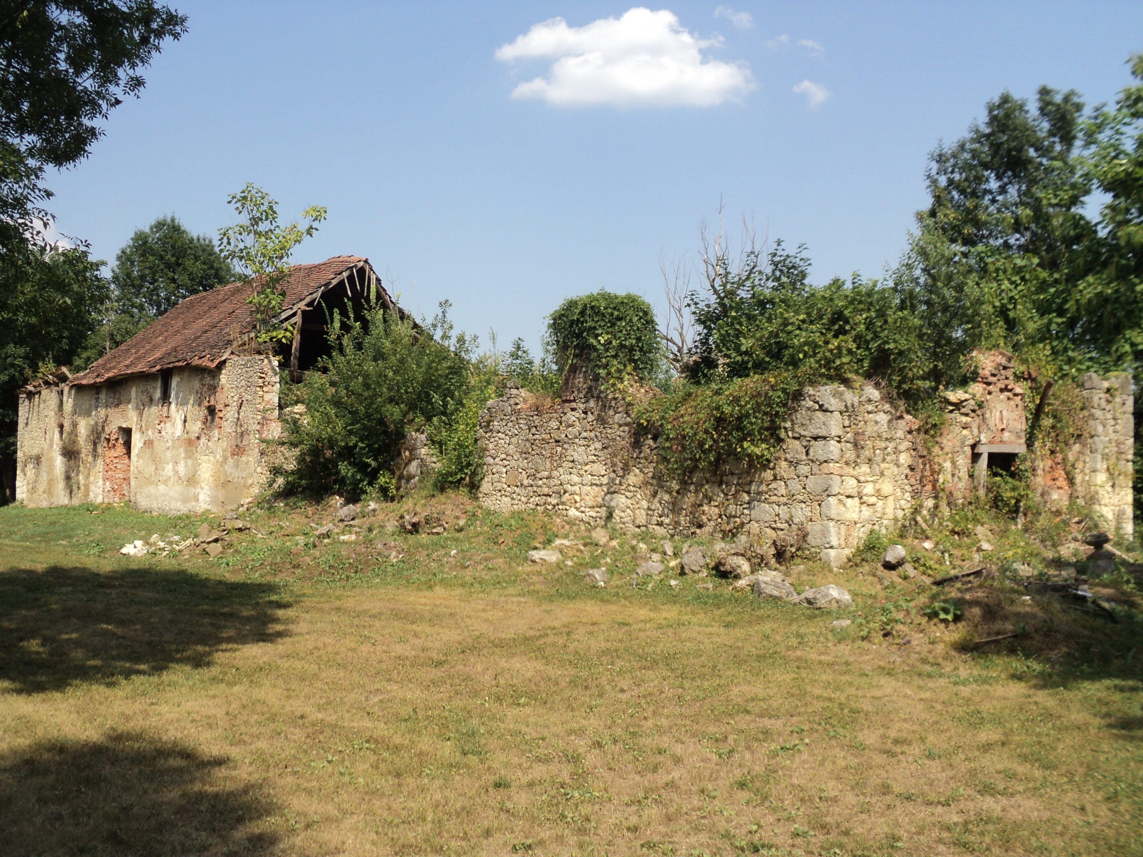 Stara urušena konjušnica u Gornjem Pokupju pokraj Dvorca Türk - Mažuranić.